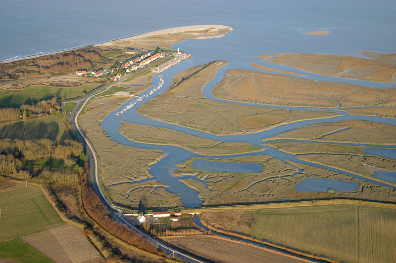 Le Hourdel, ses vasières et son port, sur l'estuaire de la Somme (Commune de Cayeux-sur-Mer), ancien port de pêche